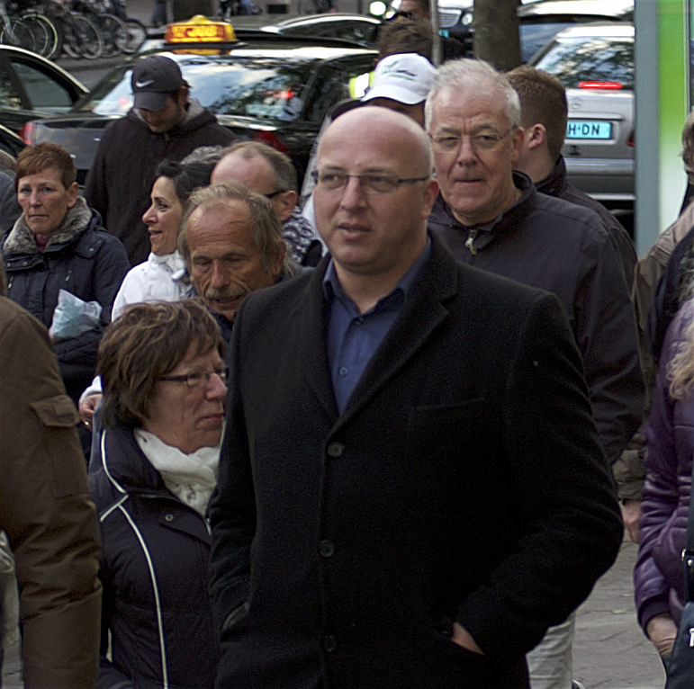 PVV'er Sietse Fritsma